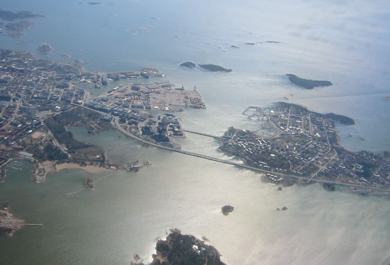 Vue aérienne de Lauttasaari, en Finlande.